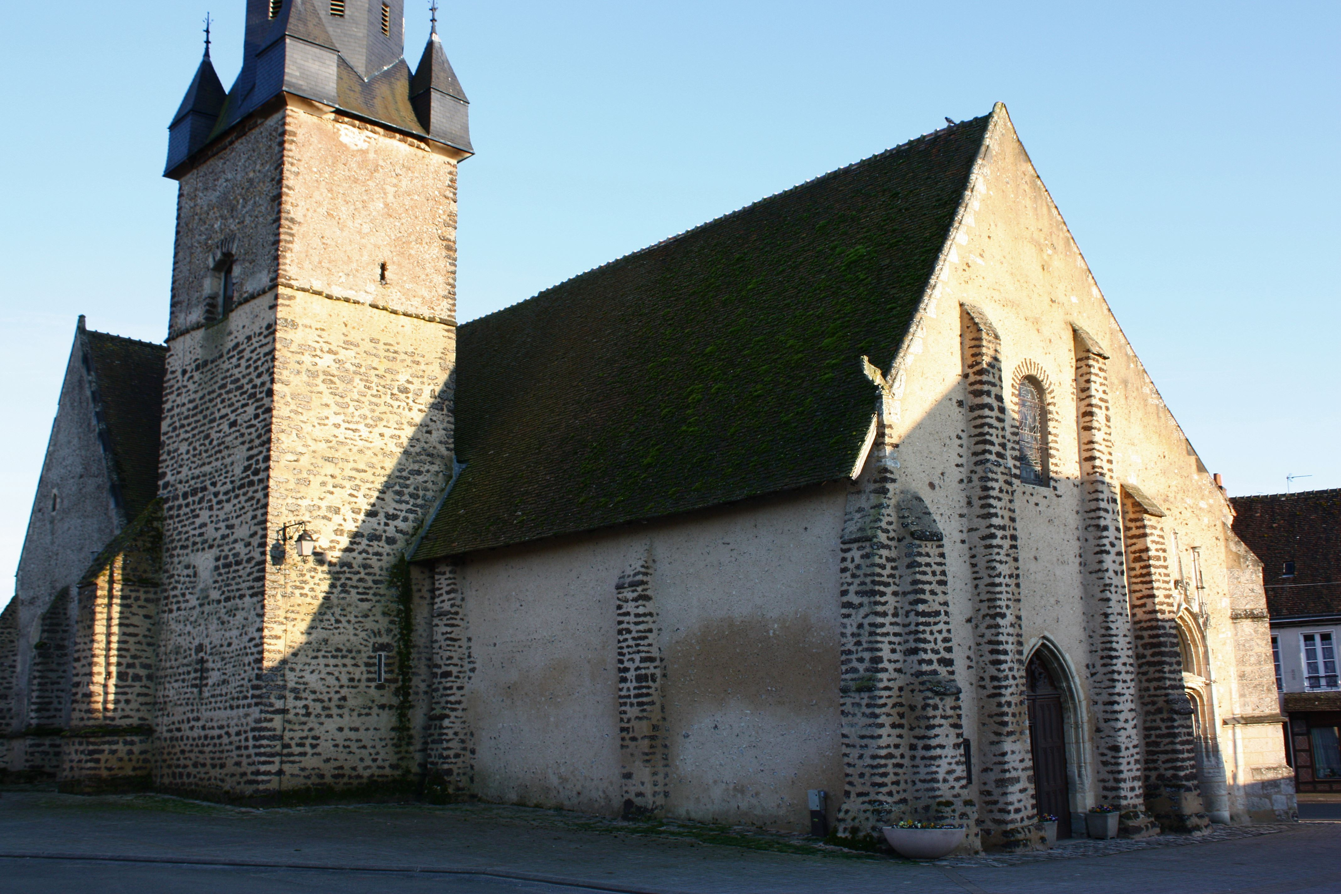 La Bazoche-Gouet - Eglise Saint-Jean-Baptiste Vue générale au Nord-Ouest